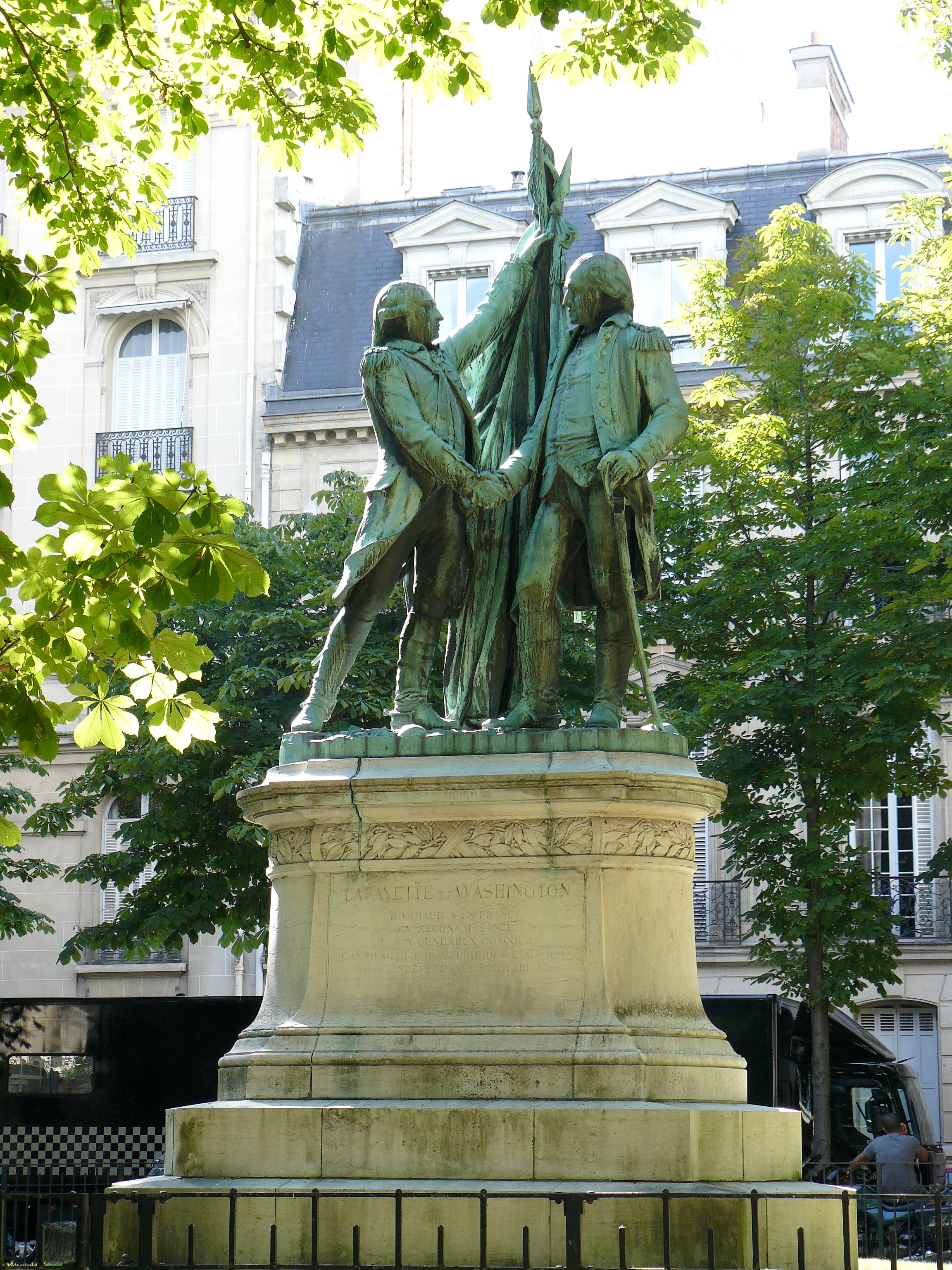 Groupe en bronze de Bartholdi (1890) - sur le socle : « La Fayette et Washington Hommage à la France en reconnaissance de son généreux concours dans la lutte du peuple des États-Unis pour l'indépendance et la liberté » En haut du square des États-Unis, Paris (16e arrond.)